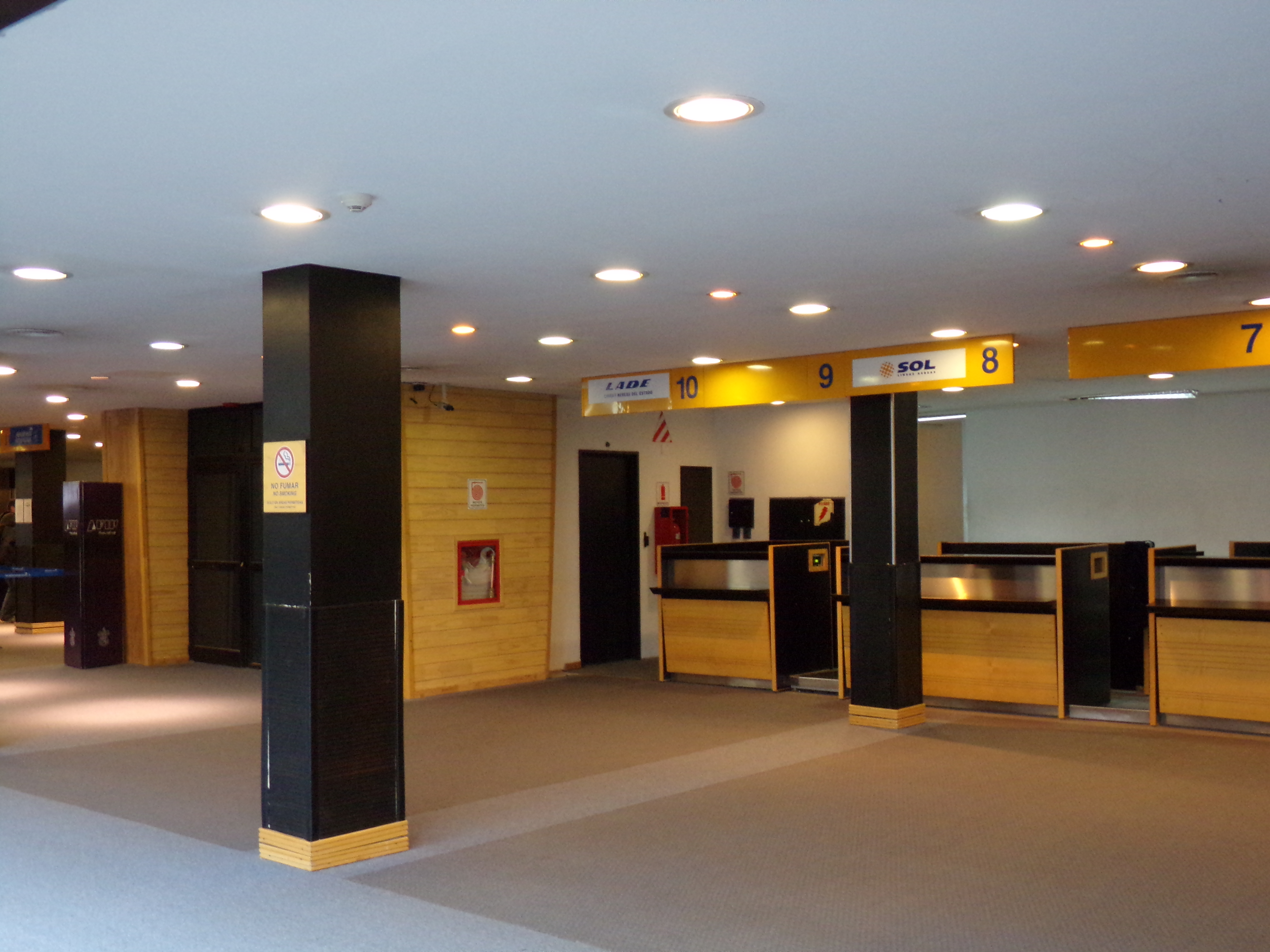 USH - Malvinas Argentinas Airport, Ushuaia, Tierra del Fuego, Argentina